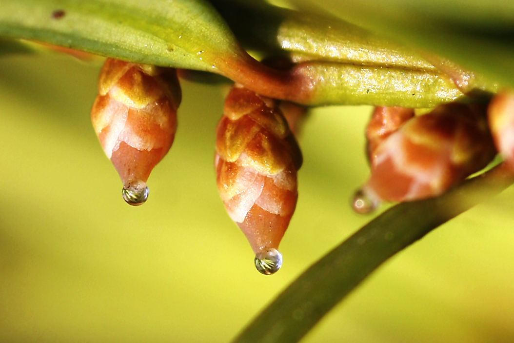 weibliche Eibenblüte mit Befruchtungstropfen